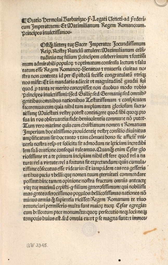 Hermolaus Barbarus, Oratio, 1487, pagina prima